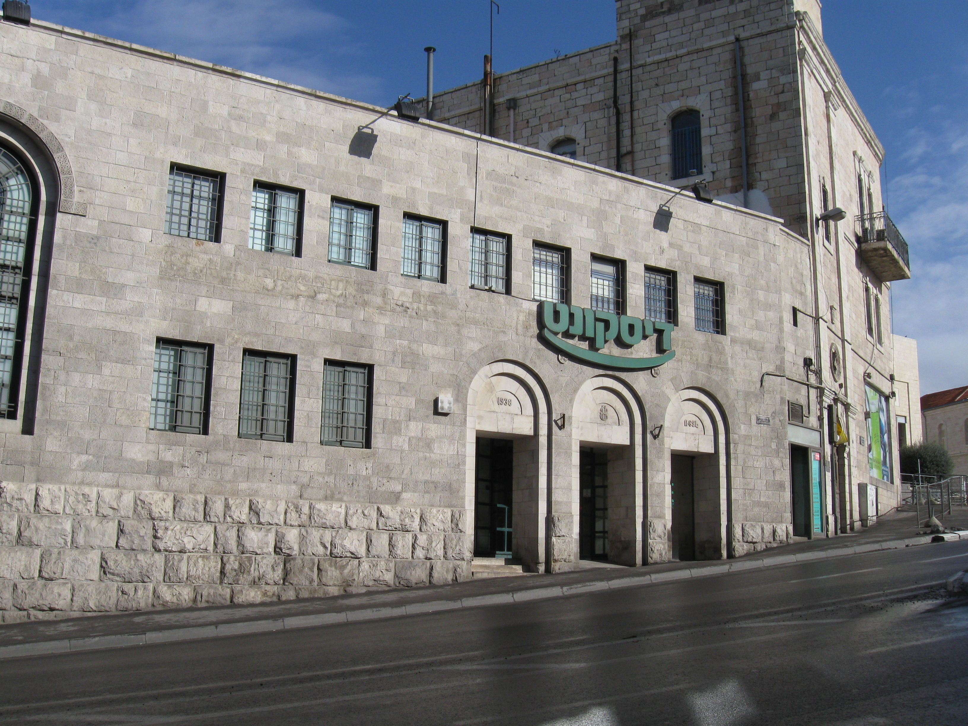 מבנה עותומן בנק רישיון נוצר על ידי משתמש:Daniel Ventura